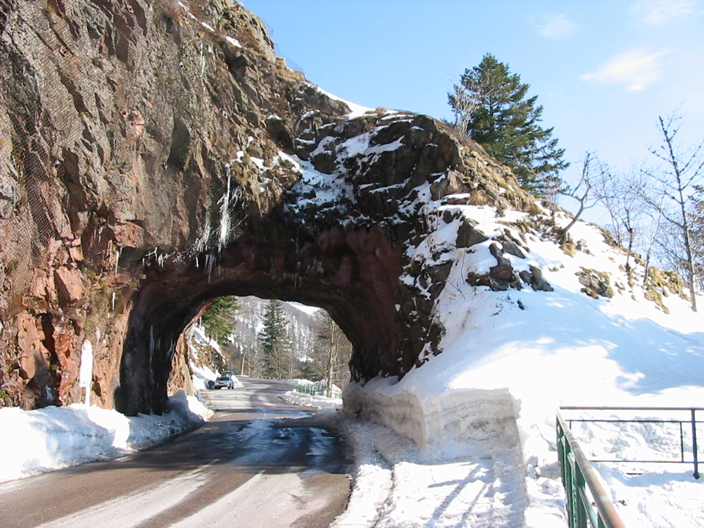 La Roche du Diable, commune de Xonrupt-Longemer, en direction du col de la Schlucht. Photo personnelle du 15 mars 2006. Copyright © Christian Amet